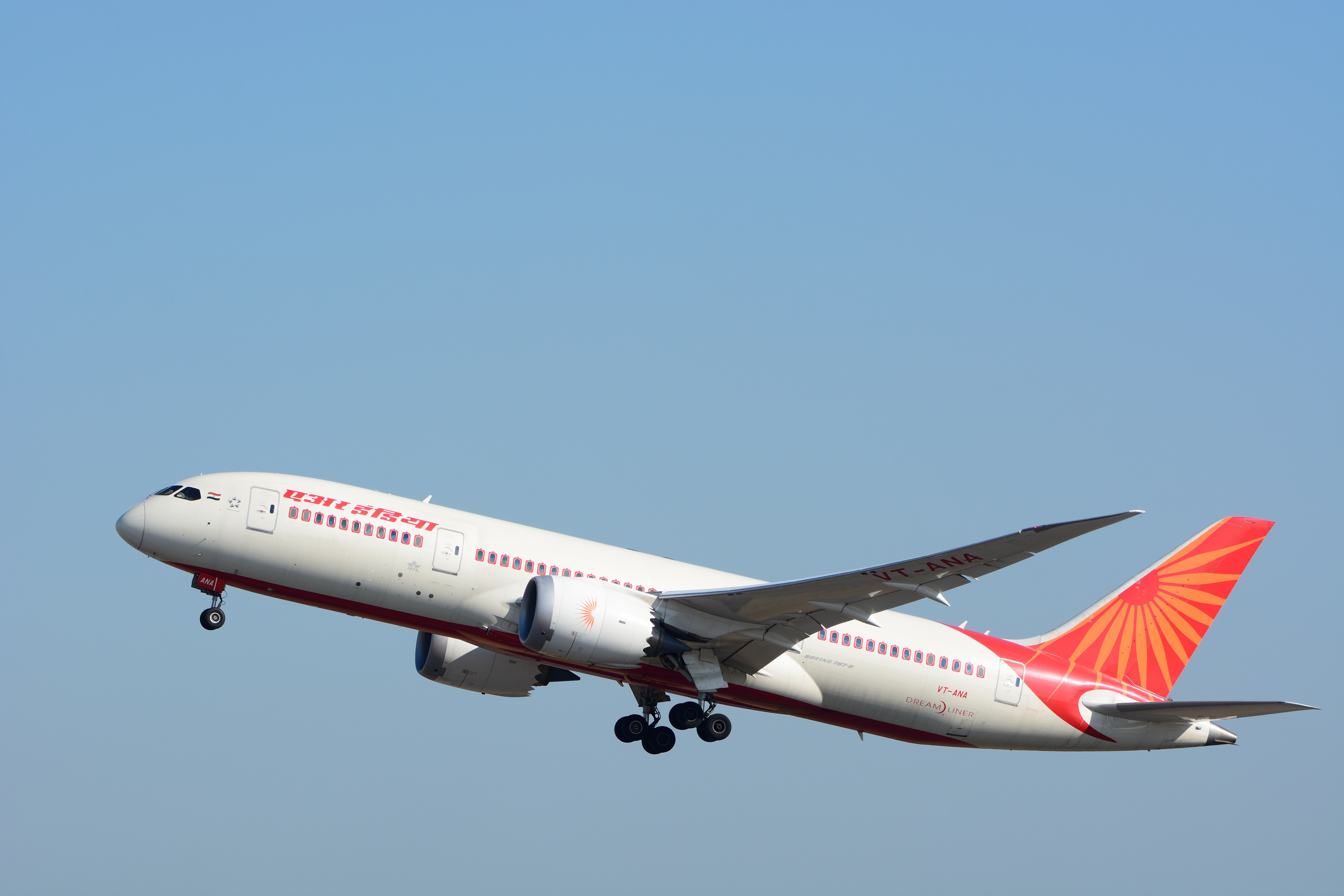 Air India Boeing 787-8 VT-ANA NRT